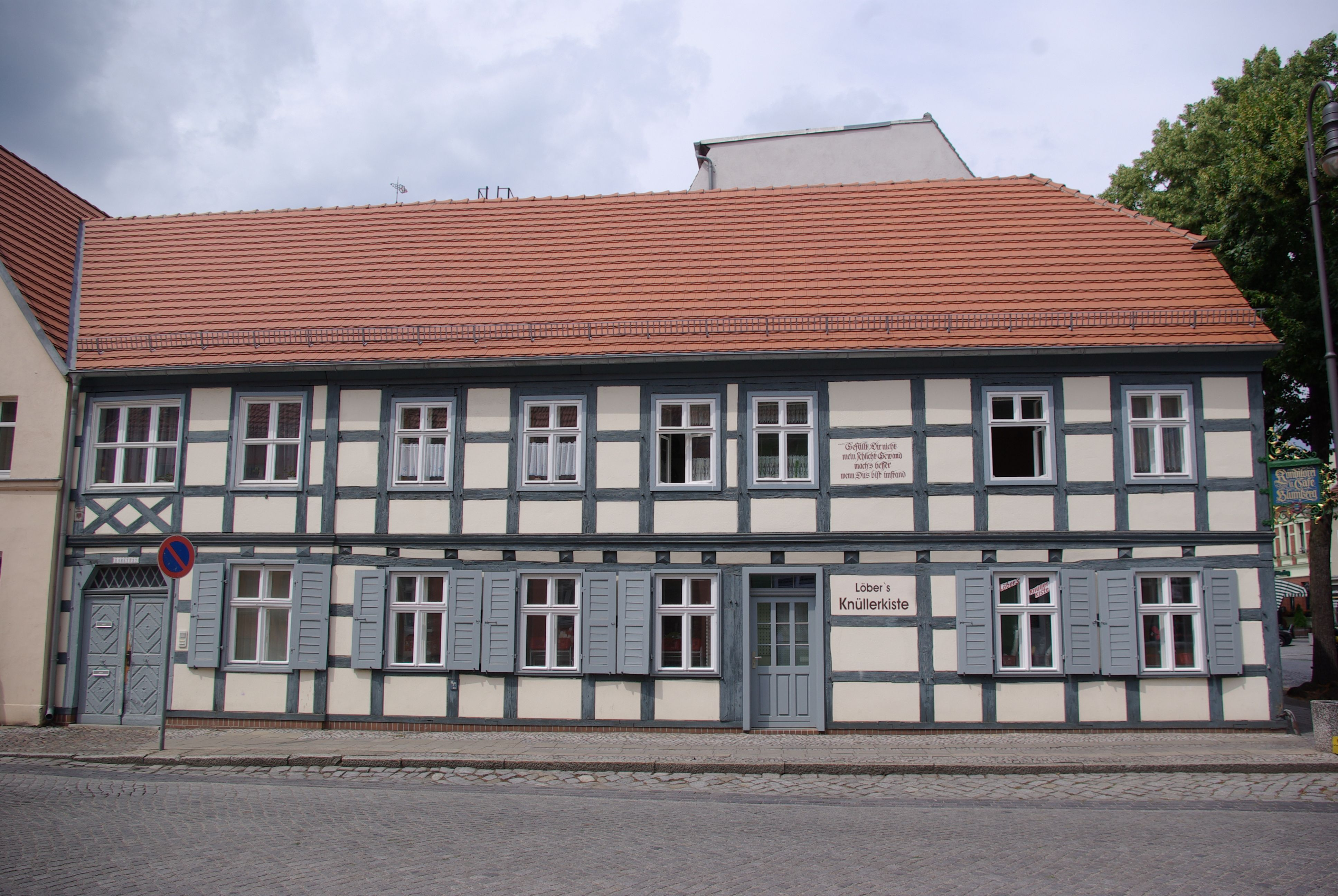 Jüterbog in Brandenburg. Das Haus Markt 17 wurde im 18. Jahrhundert erbaut. Es ist bekannt als Bäckerei Blumberg. Zu sehen ist die Ansicht von der Große Straße.